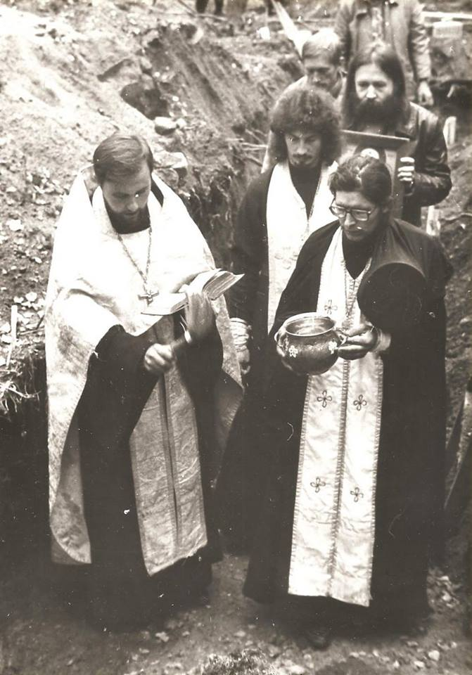 Освящение котлована под основание храма Святителя Тихона на Кончаловском кладбище в Обнинске, 1991 год